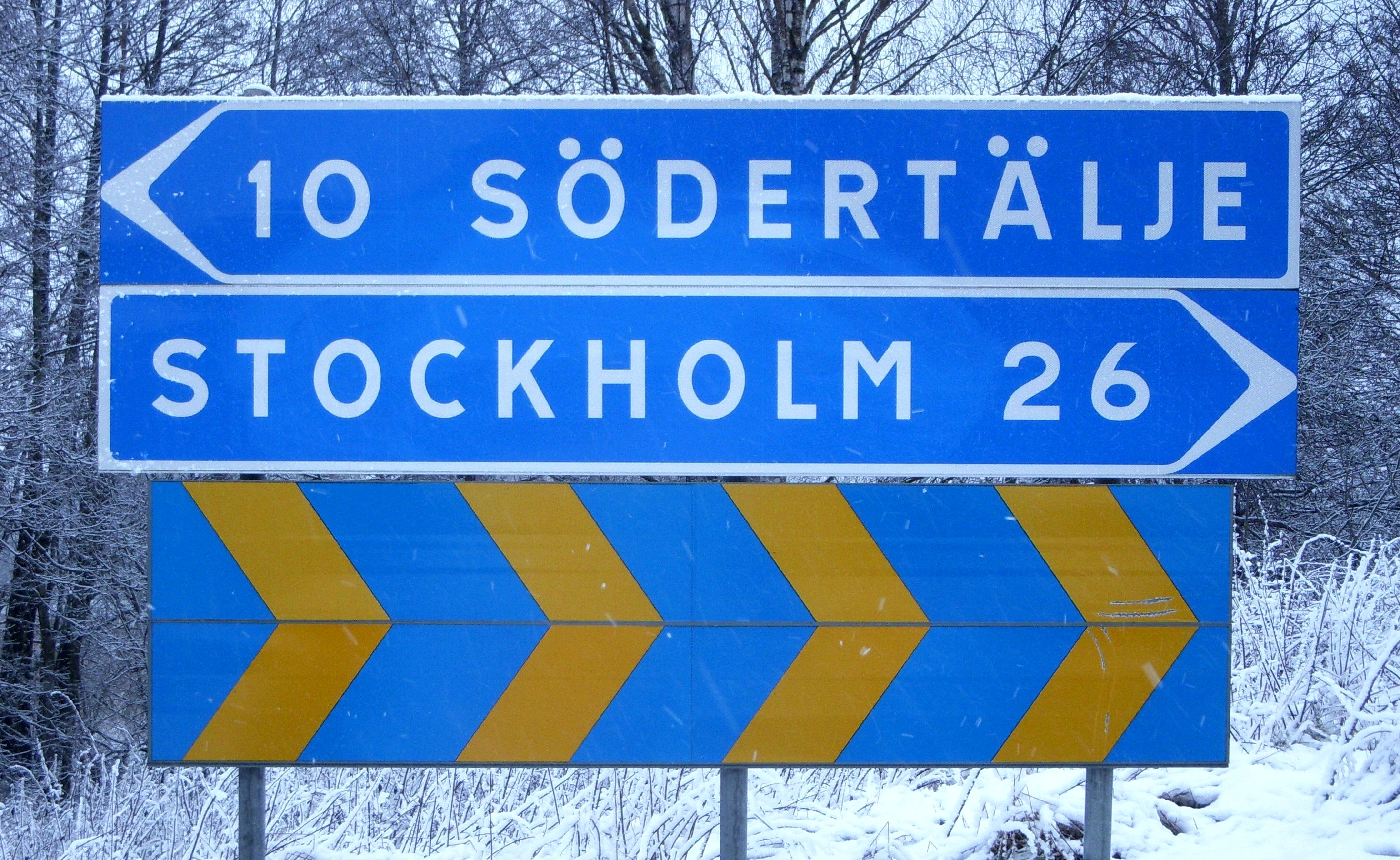 Avstångsskylt på Gamla Riksettan mellan Stockholm och Södertälje.